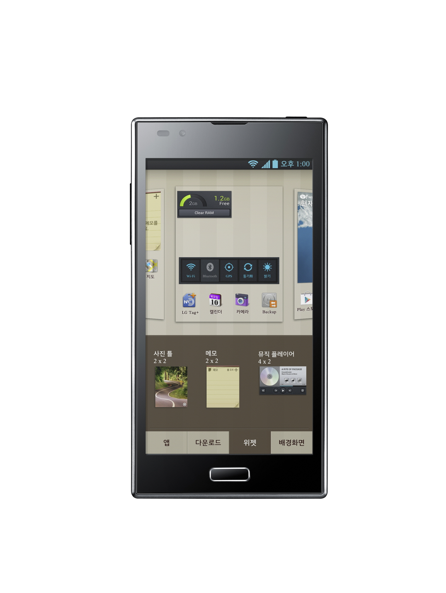 LG전자가 4일 전략 LTE 스마트폰 ‘옵티머스 LTE 2’를 전격 공개했다. LG전자는 5월 중순부터 국내 이통통신 3사를 통해 이 제품을 출시할 계획이다. 사진] 모델들이 LG전자 전략 스마트폰,‘옵티머스 LTE2’를 들고 포즈를 취하고 있다. ※ LG전자 뉴스룸 에서 관련 보도자료를 확인실 수 있습니다.